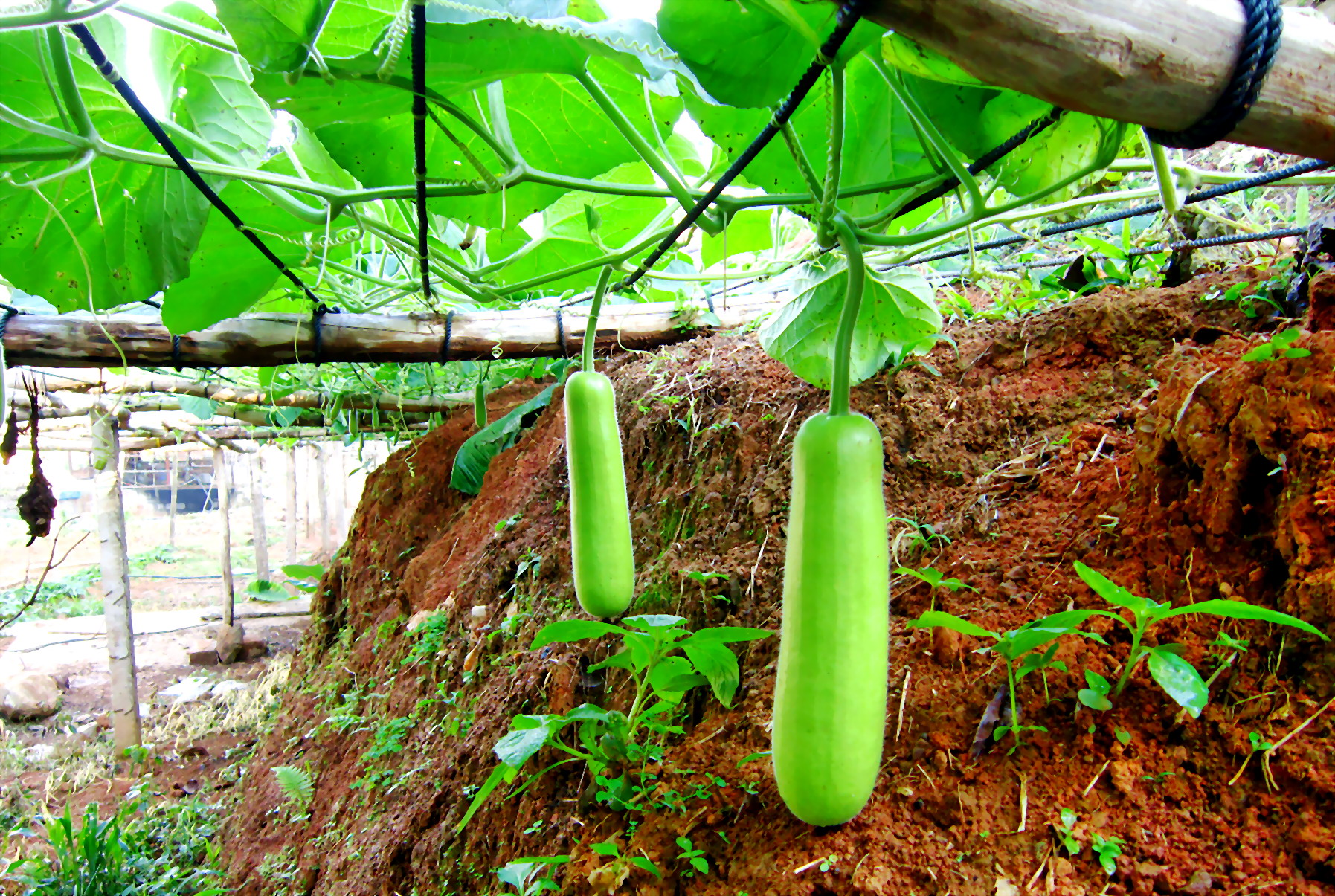 Một giàn bầu dài hình trụ, vỏ xanh trơn ở An Giang, Việt Nam.